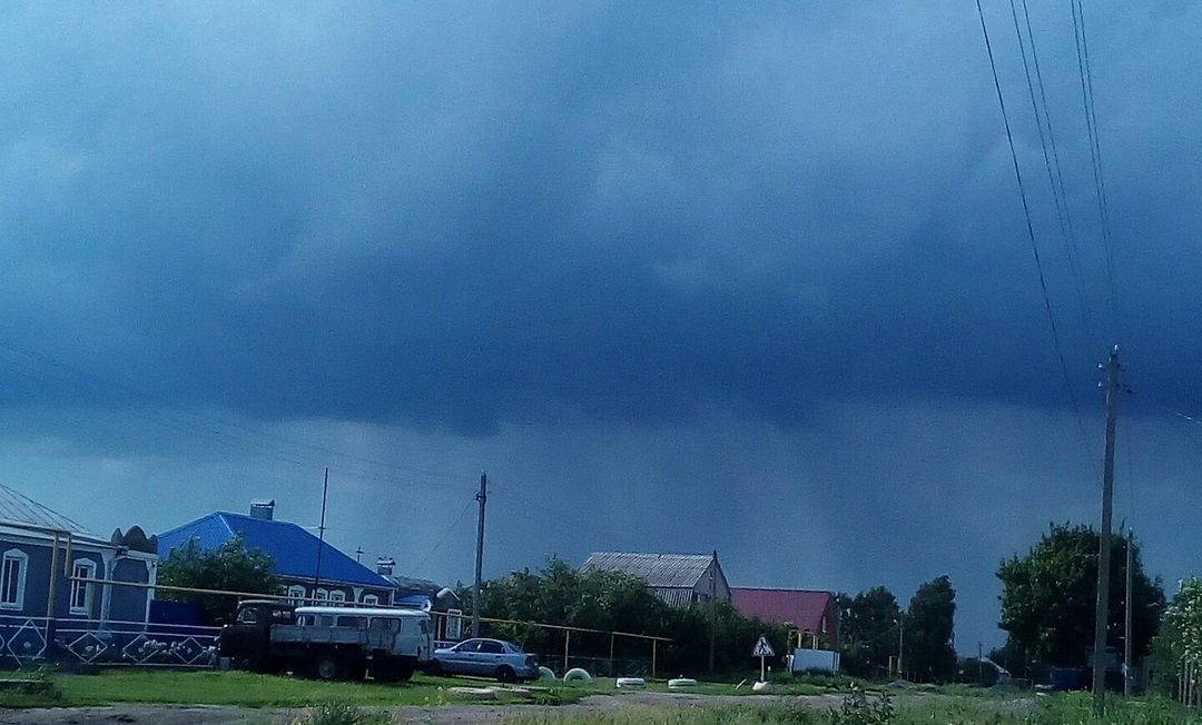 Холодный июнь 2017 года